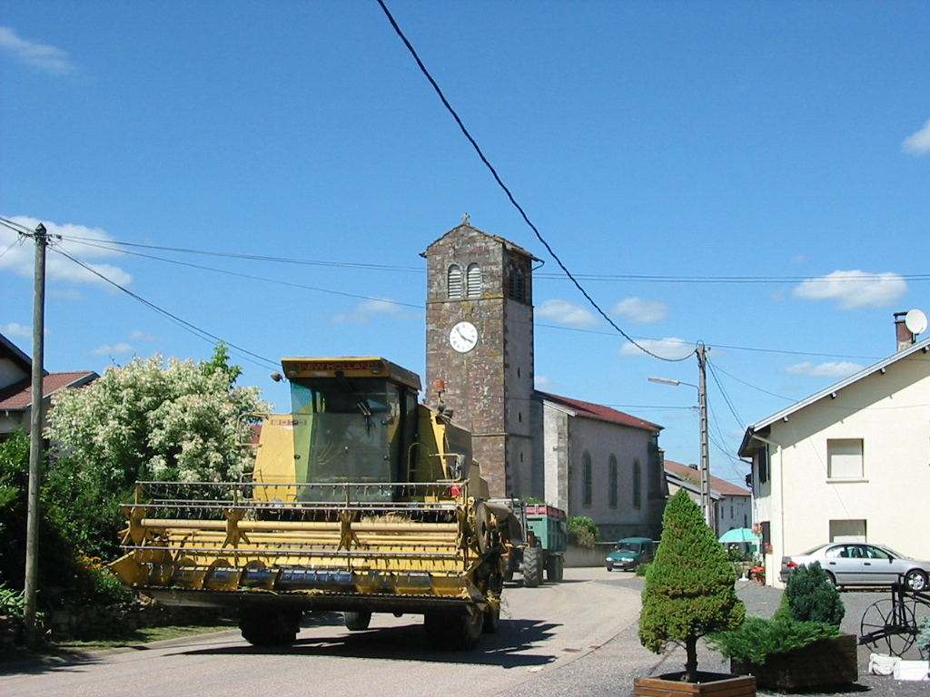 Dignonville – Au retour de la moisson (New Holland 8050 ou 8070) ; Commune du canton d'Épinal-Est (Vosges)